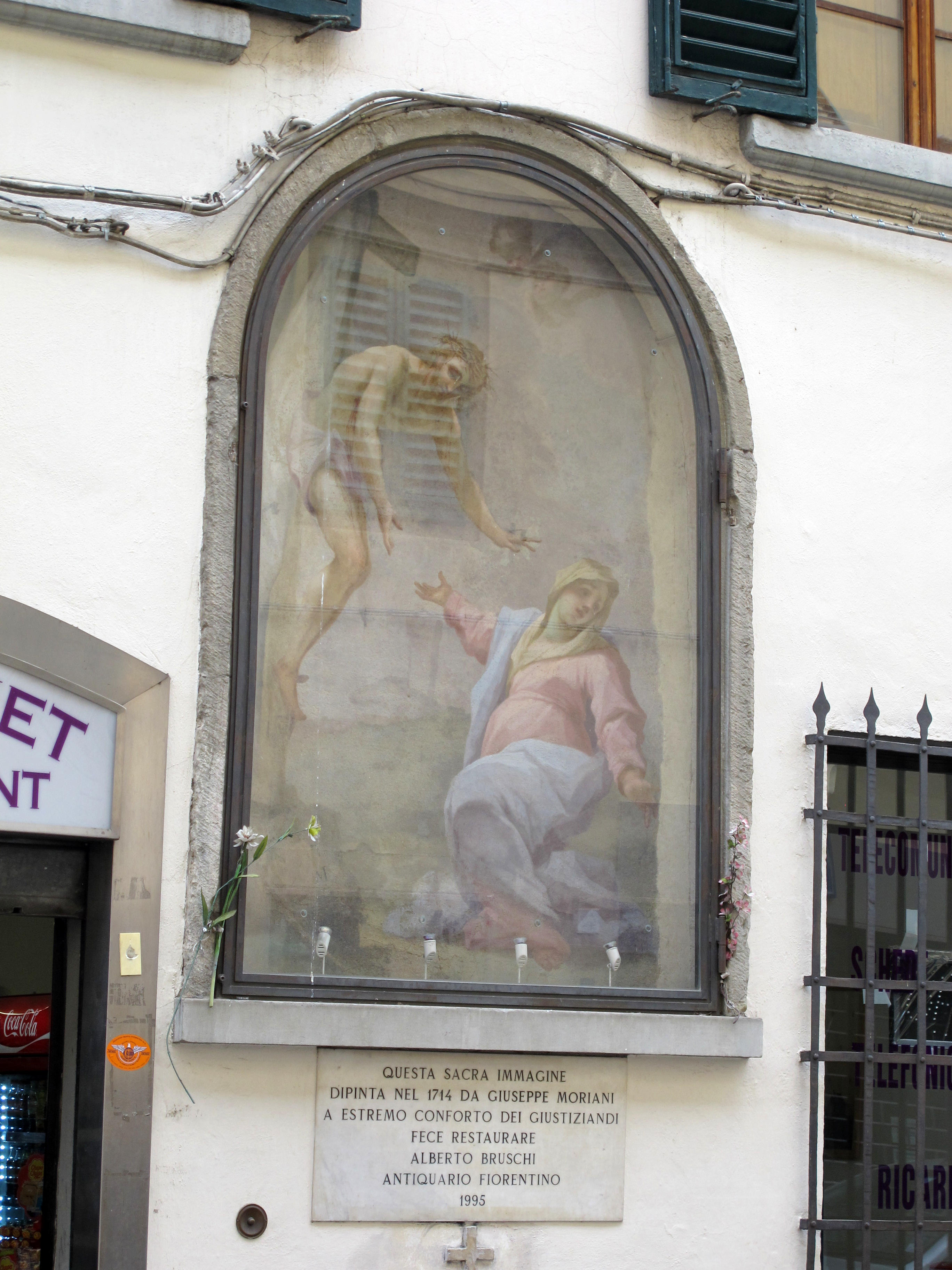 Tabernacolo di borgo la croce